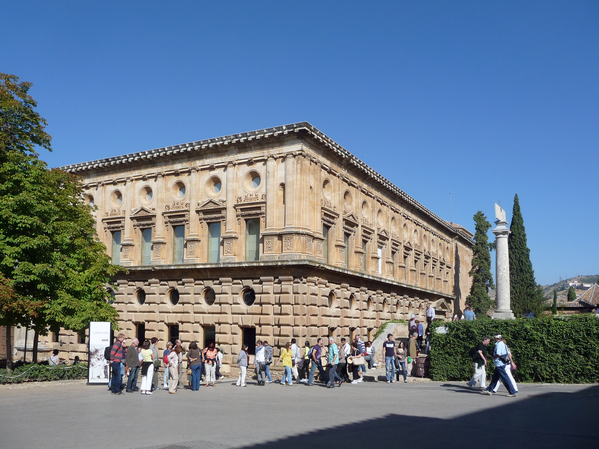 Granada-P1050006.JPG